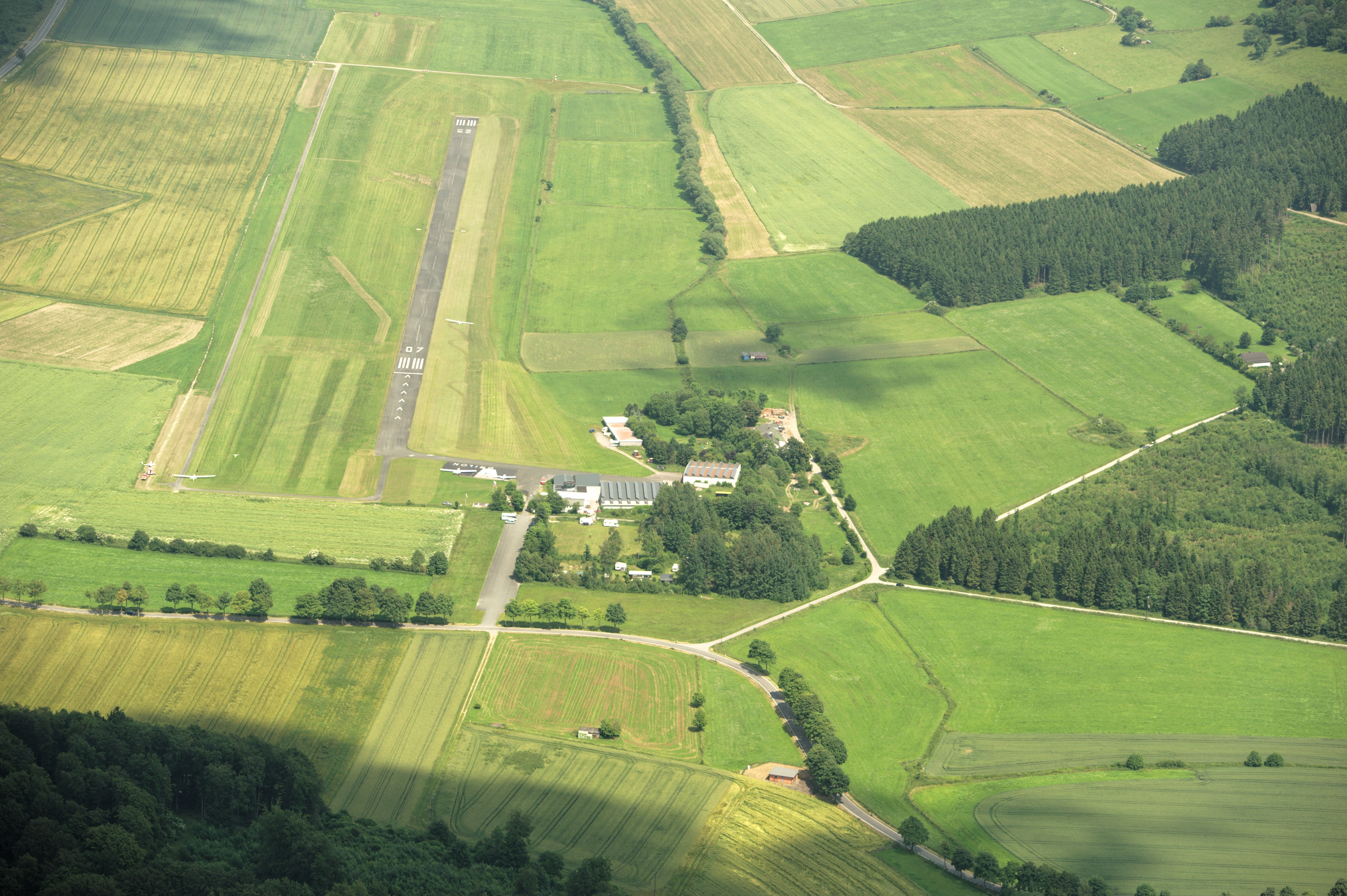 Fotoflug Sauerland-Ost, Flugplatz Brilon-Thülen